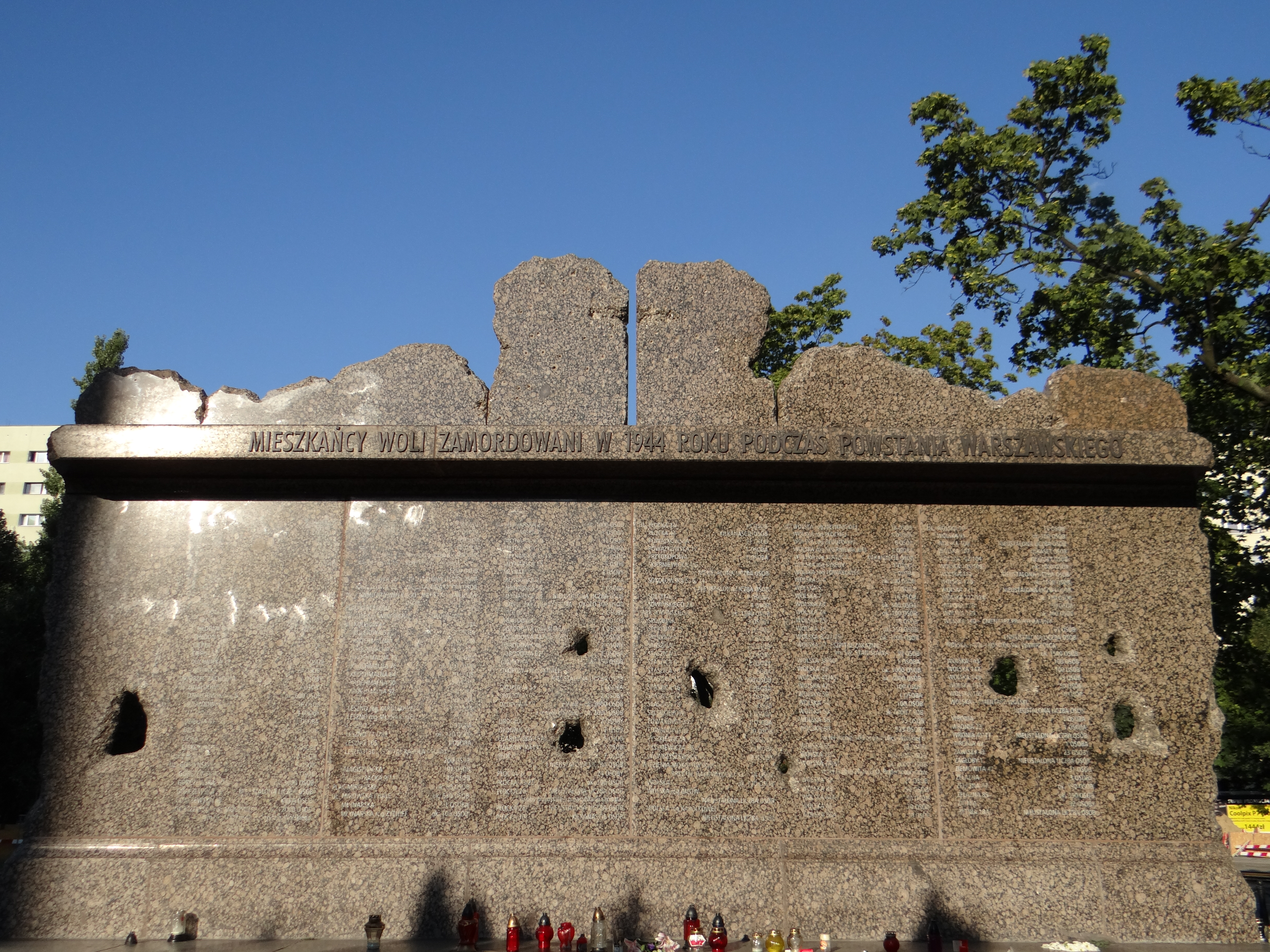 Pomnik poświęcony pamięci ofiar rzezi Woli, ku przestrodze przyszłych pokoleń zlokalizowany jest na Skwerze Pamięci u zbiegu al Solidarności i ul Leszno w Warszawie. Zachodnia strona płyty pomnika zawiera ilościowy wykaz ofiar poszczególnymi numerami ulic Woli.